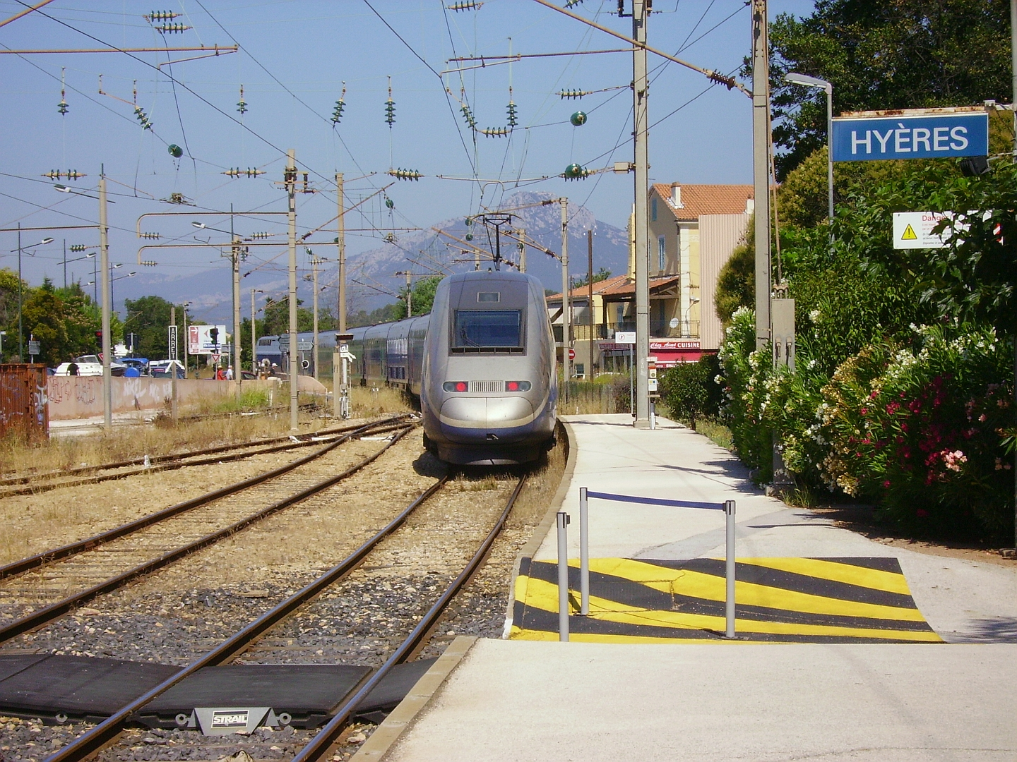 Le TGV Duplex 6116 quitte la gare de Hyères en direction de Paris-gare de Lyon le 10 juillet 2008.